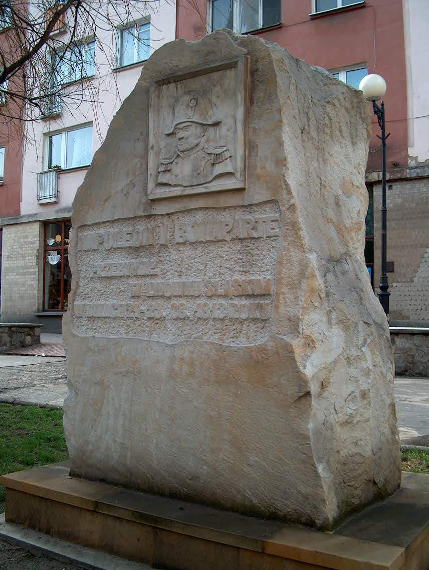 Pomnik upamiętniający pobyt Napoleona we Lwówku Ślaskim